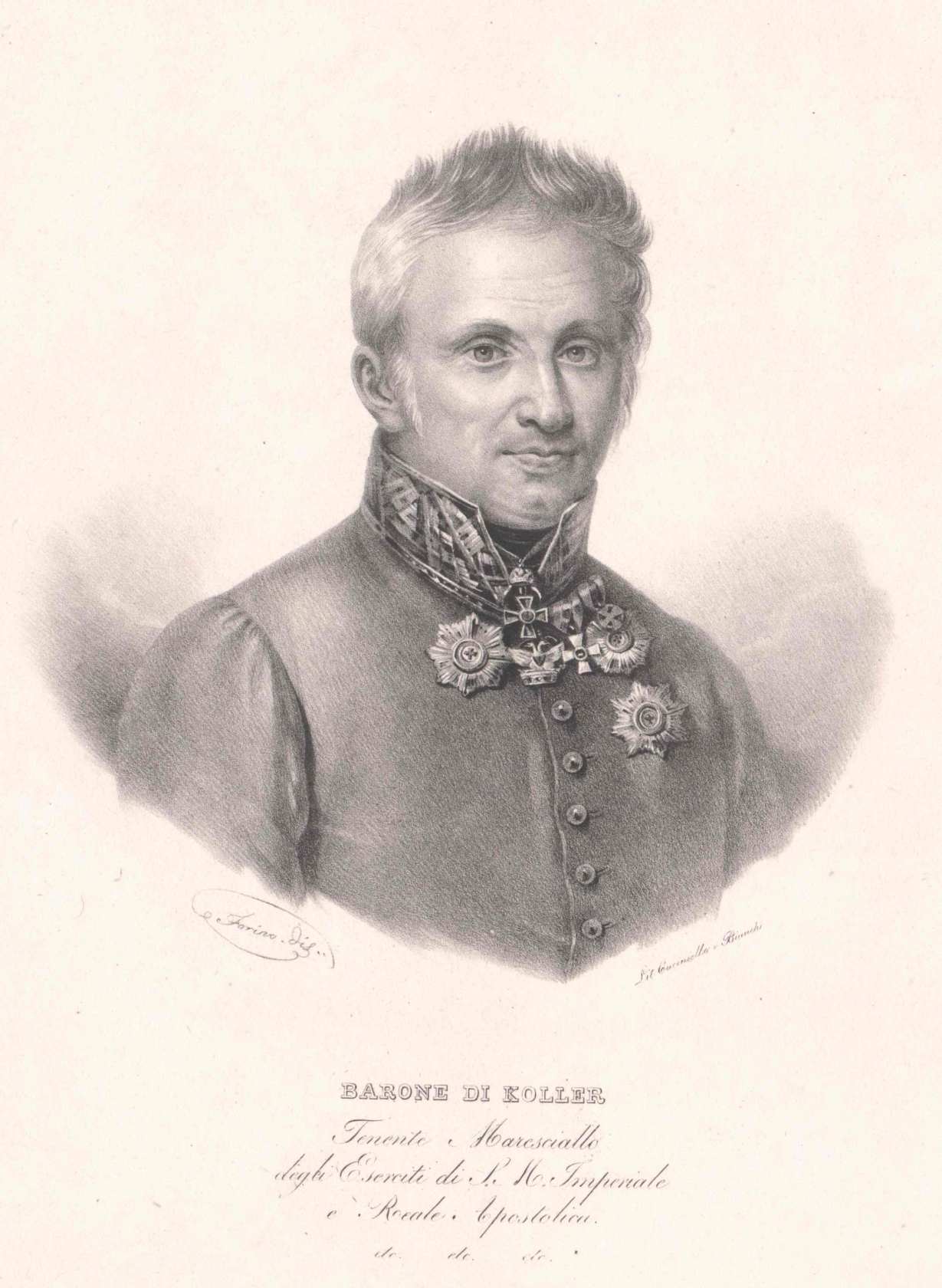 František Arnošt Koller "Barone di Koller" (1767; †1826), voják a diplomat.